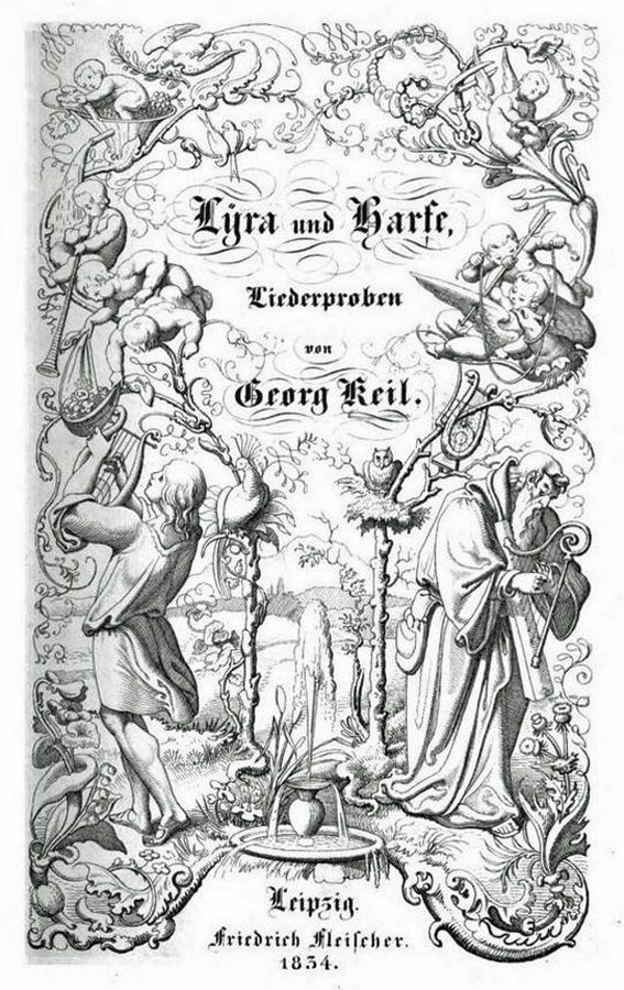 Deckblatt zu Johann Georg Keils Gedichtband Lyra und Harfe